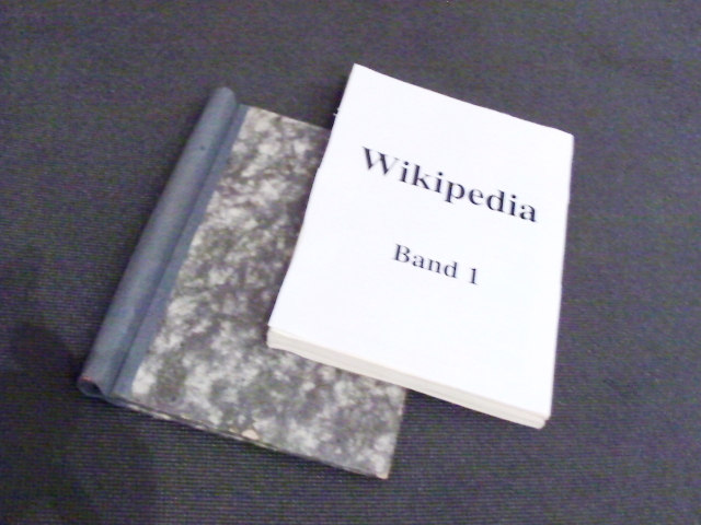 springback binder